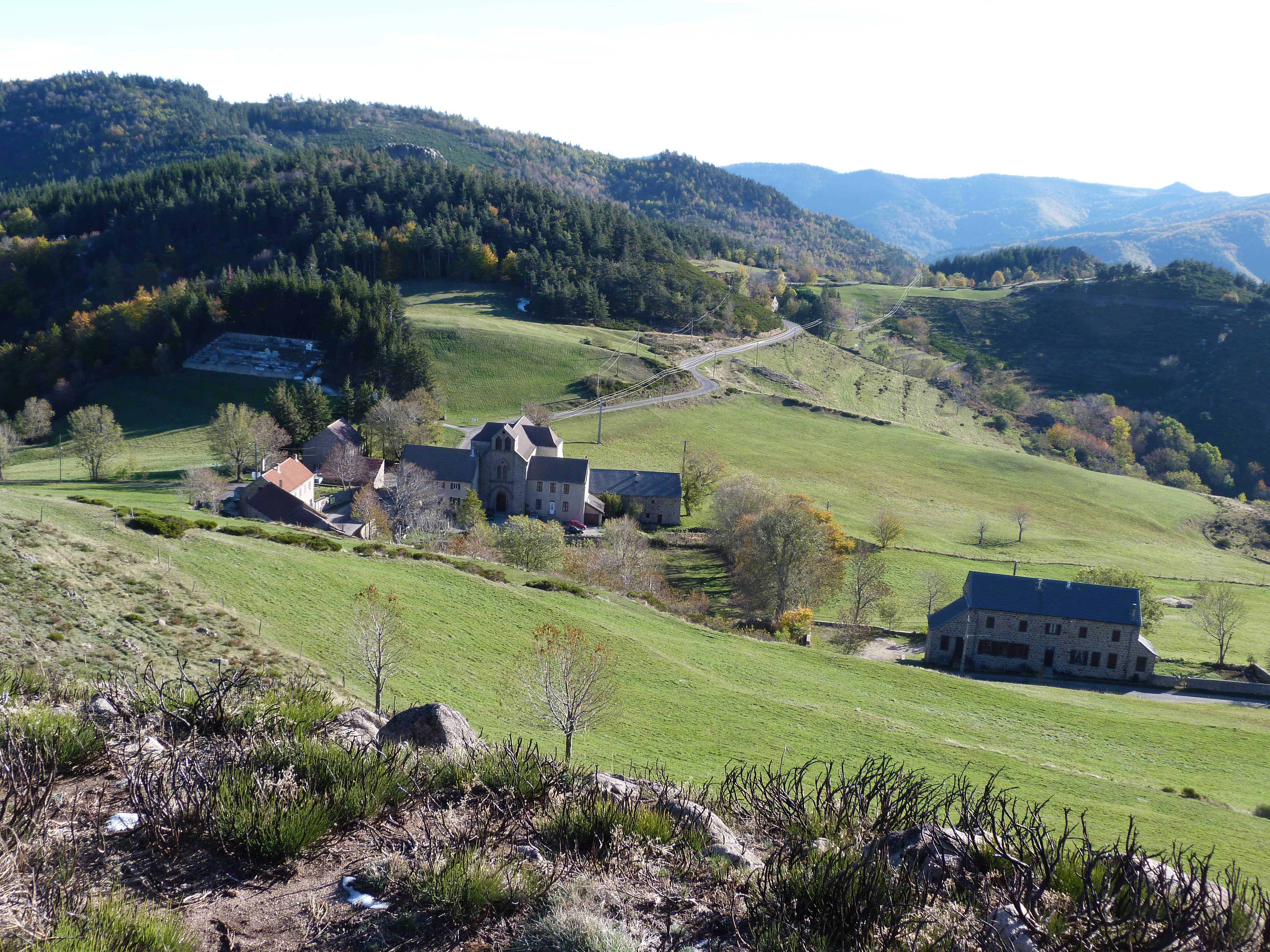 Photo du petit village de St Andéol de Fourchades